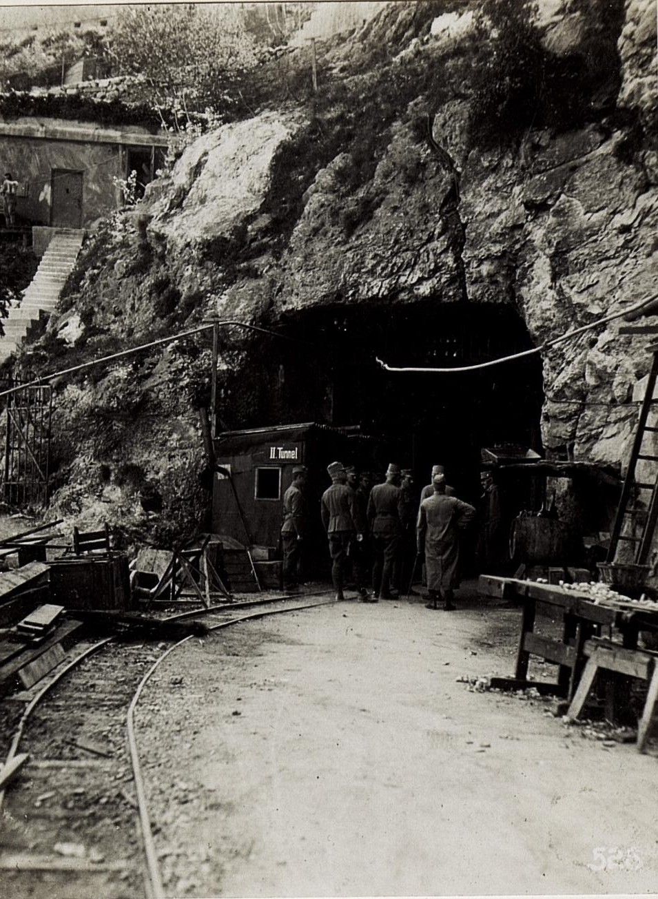 Beim ersten Tunnel der Ponalestraße.